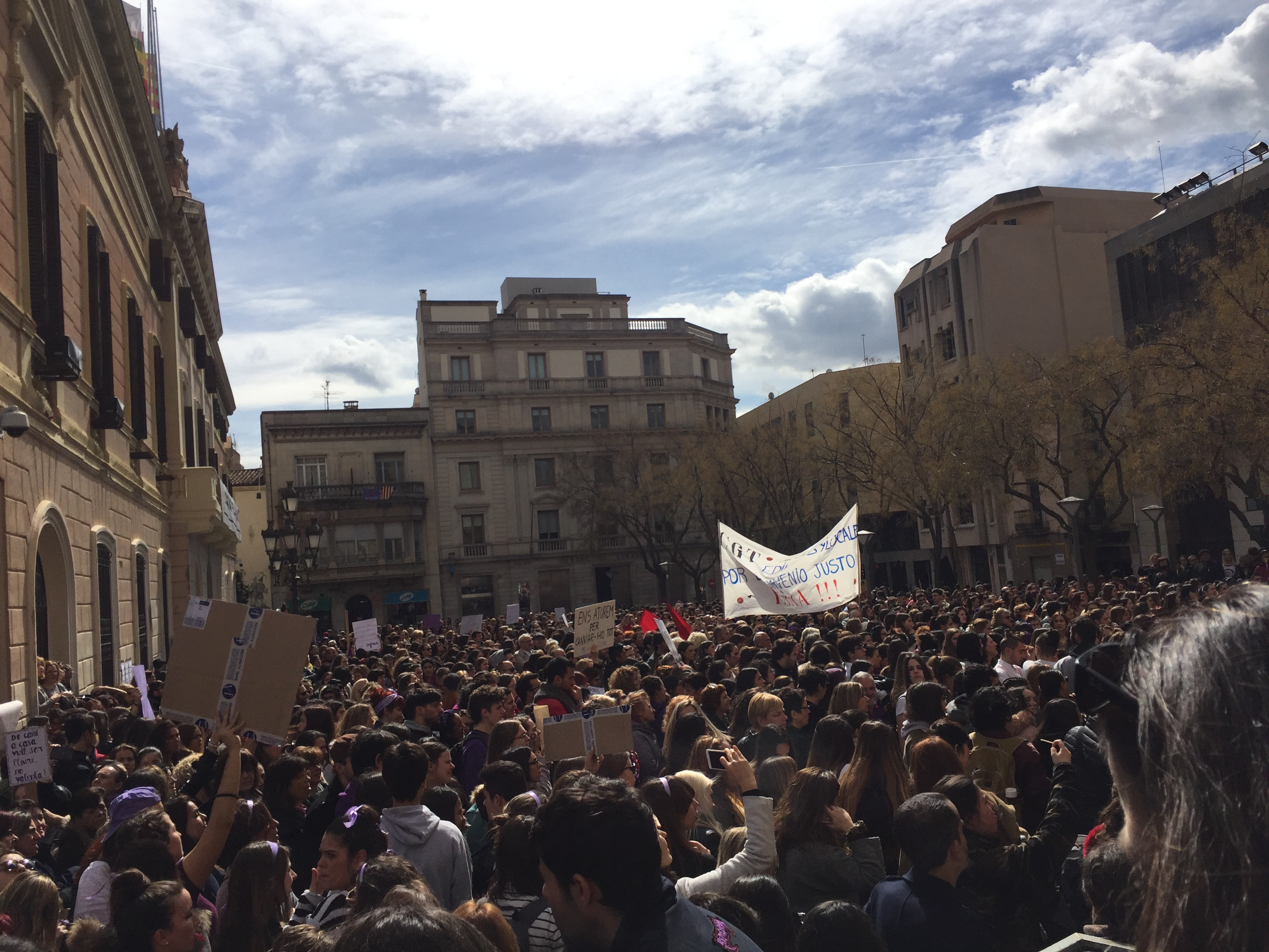 Vaga feminista 8M 2018 a Sabadell